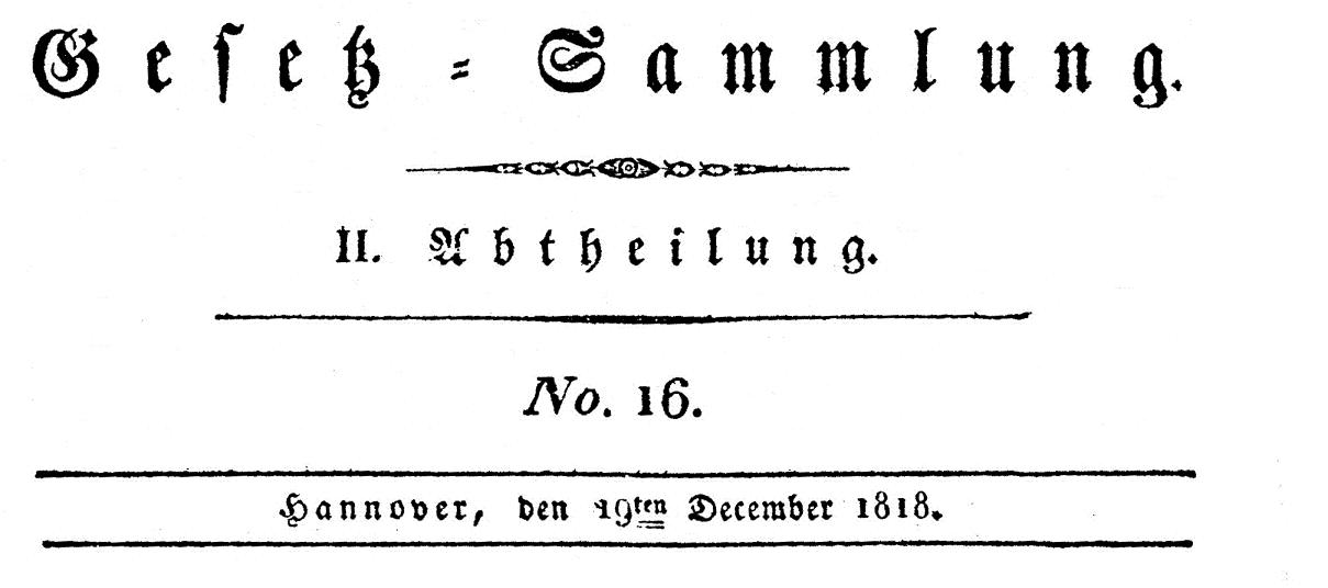 Hannover - Sammlung der Gesetze ...